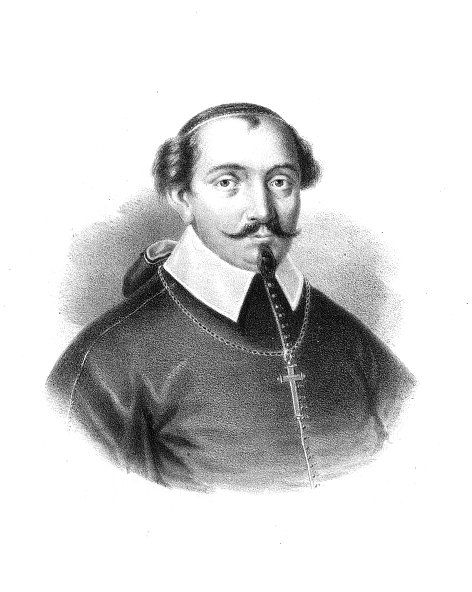 Maciej Drzewicki primate of Poland